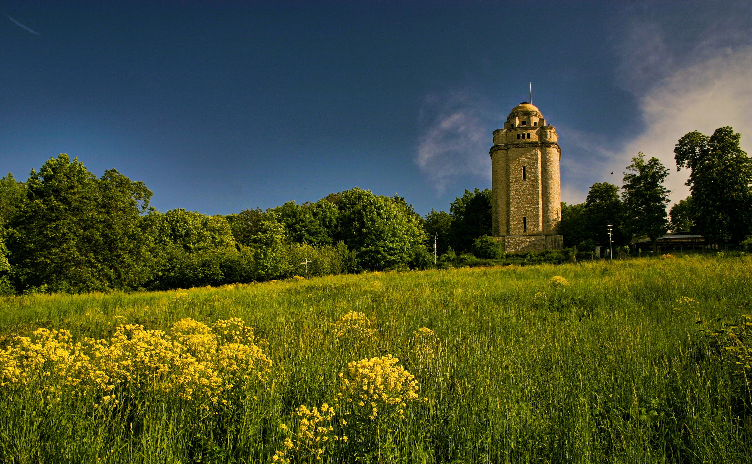 Bismarckturm bei Ingelheim im Mai 2019